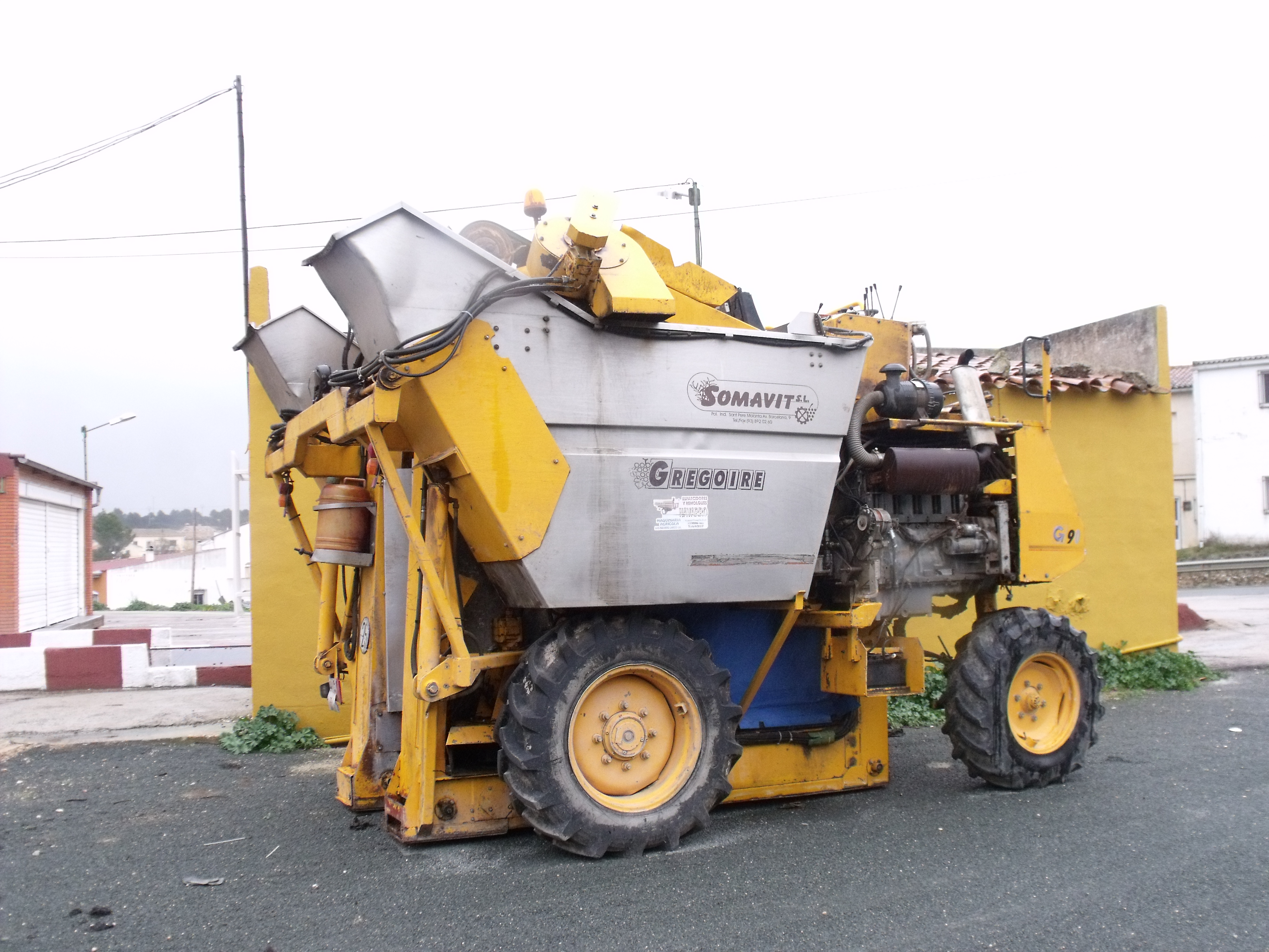 Imágenes de una cosechadora de uva